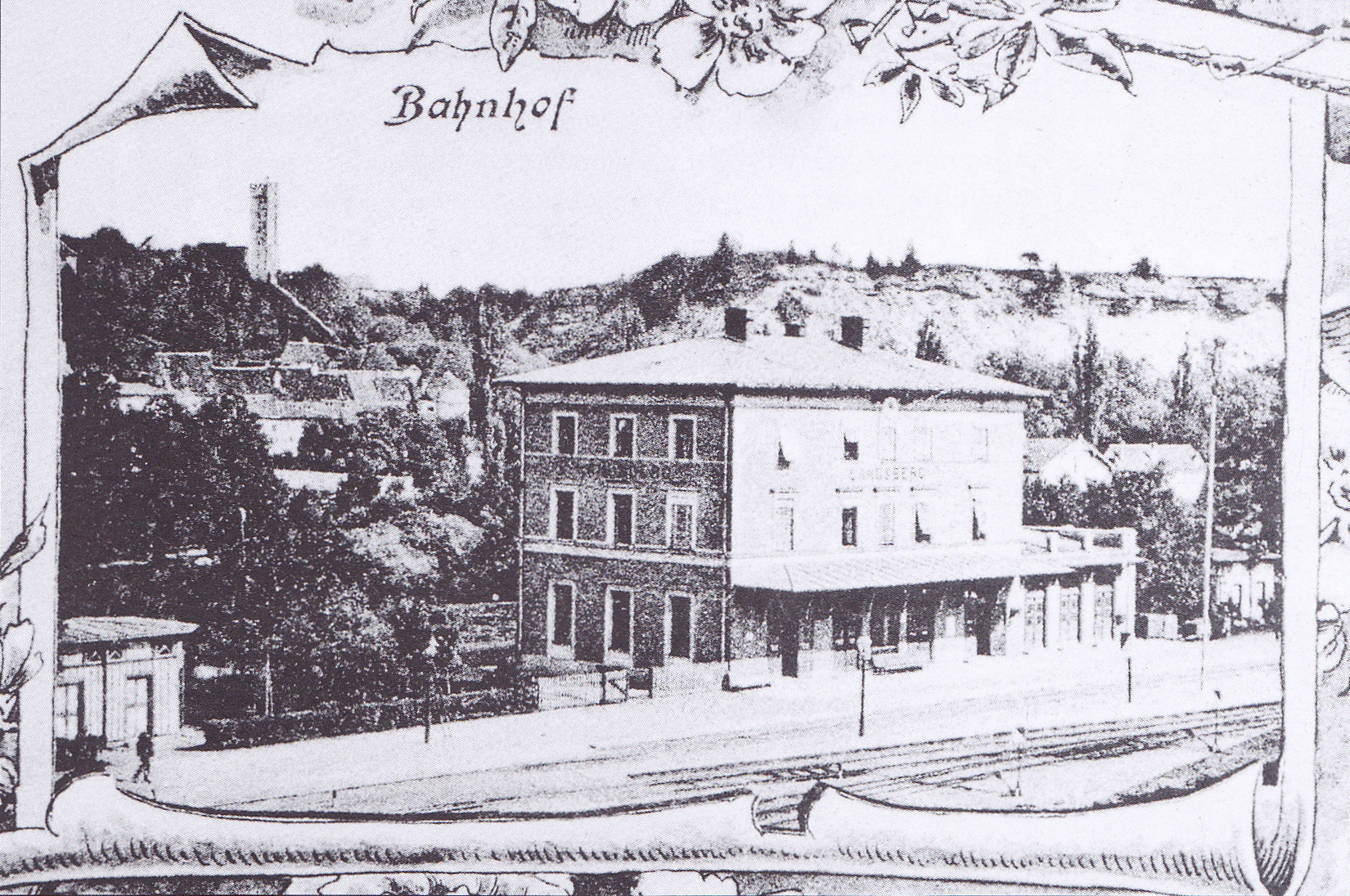 Bahnhof Landsberg (Lech) auf einer historischen Postkarte